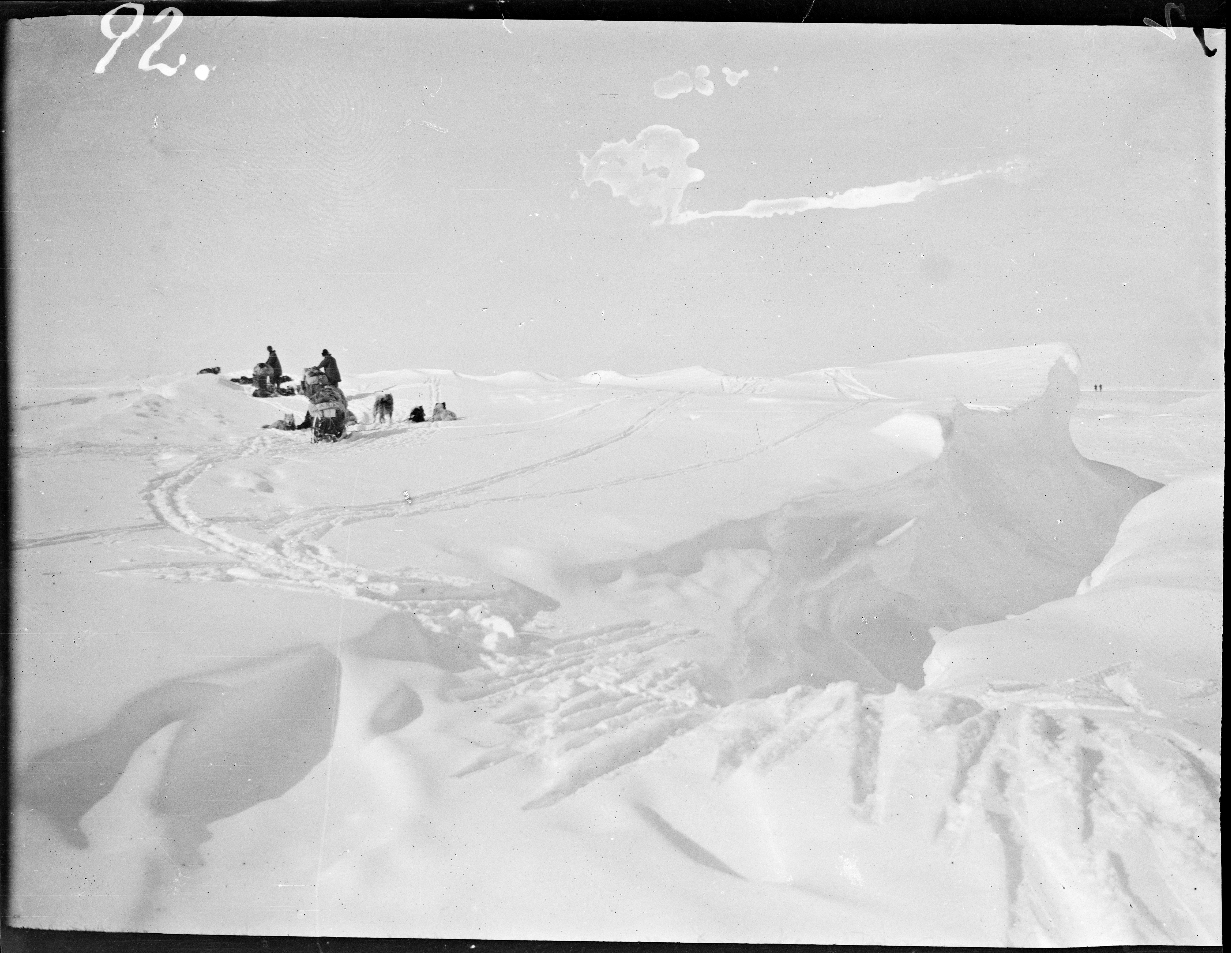 Tittel / Title: Hundesleder, antakelig på vei gjennom det som ble kalt "Djevelbreen" på ferden til Sydpolen. Motiv / Motif: Dette området var svært ulendt, og man måtte stadig gå lange omveier for å komme frem. Selve ferden fra Framheim til polpunktet og tilbake tok 99 dager og omtrent 3000 km ble tilbakelagt. Dato / Date: 29. november 1911 Fotograf / Photographer: ukjent / unknown Sted / Place: Antarktis / Antarctica Eier / Owner Institution: Nasjonalbiblioteket / National Library of Norway Lenke / Link: Bildesignatur / Image Number: bldsa_NPRA0740